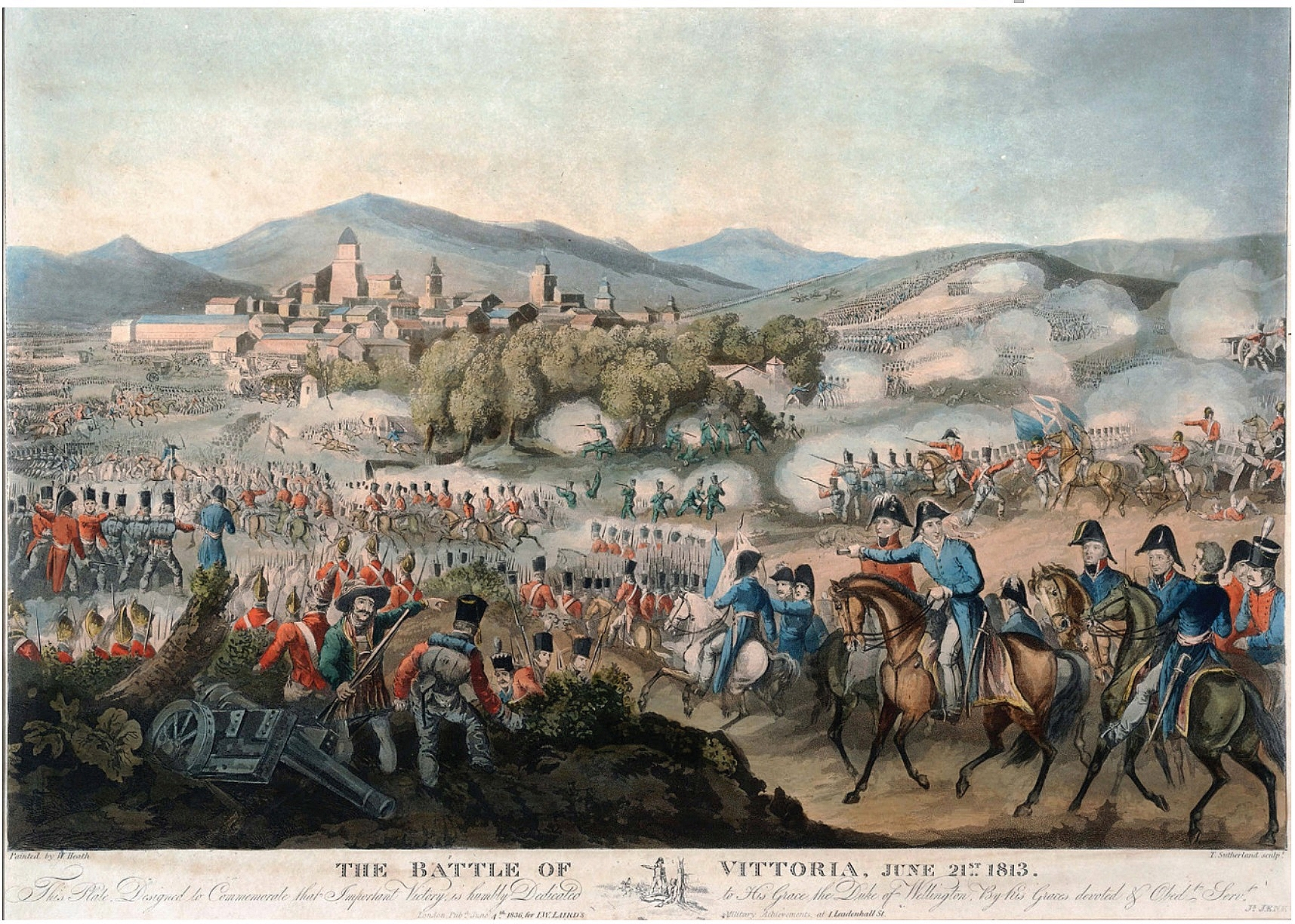 Napoleonic wars. Peninsular war. Batalla de Vitoria Battle of Vitoria, by Heath & Sutherland, A.S.K. Brown collection